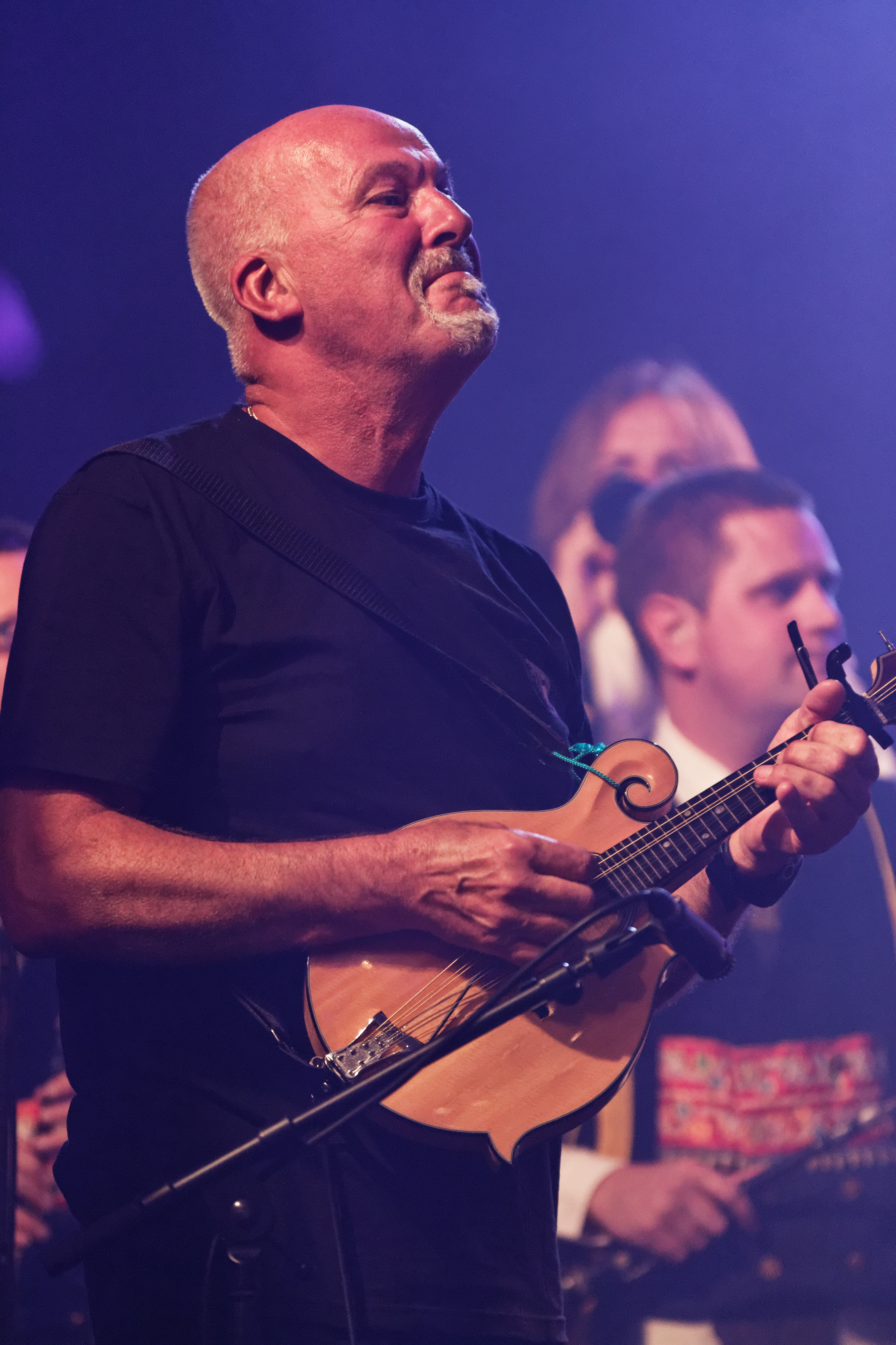 Dan ar Braz en concert sur la scène Gradlon lors du festival de Cornouaille 2013.